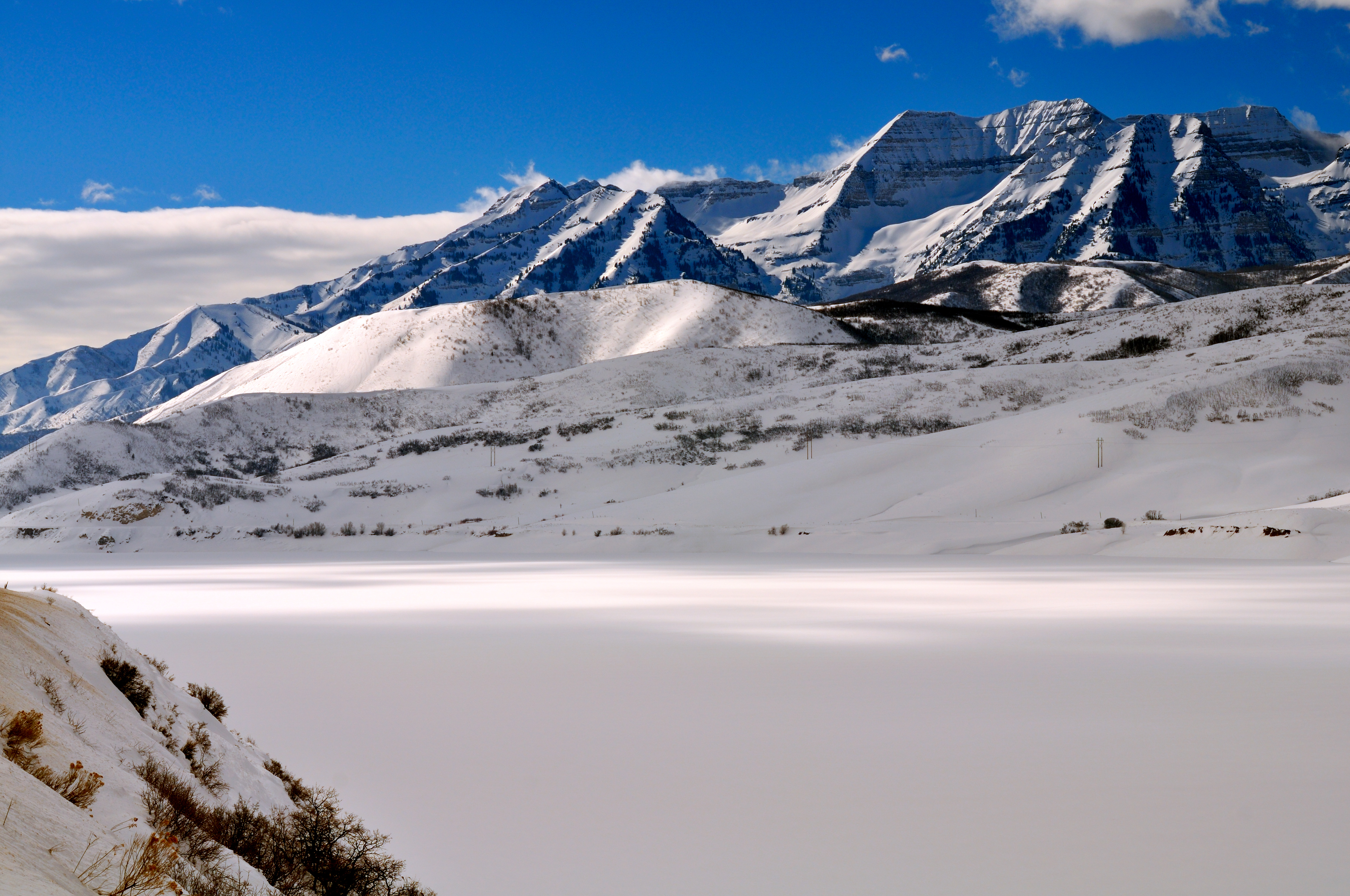 Mount Timpanogos